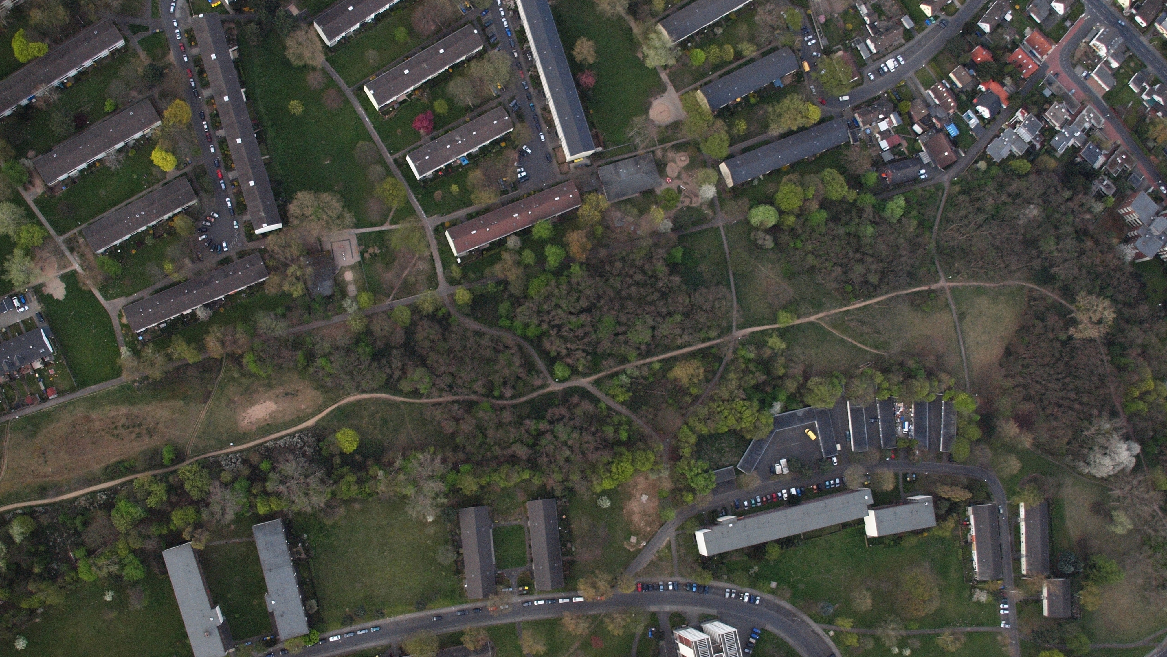 Düne Tannenbusch, Bonn: Senkrechtaufnahme